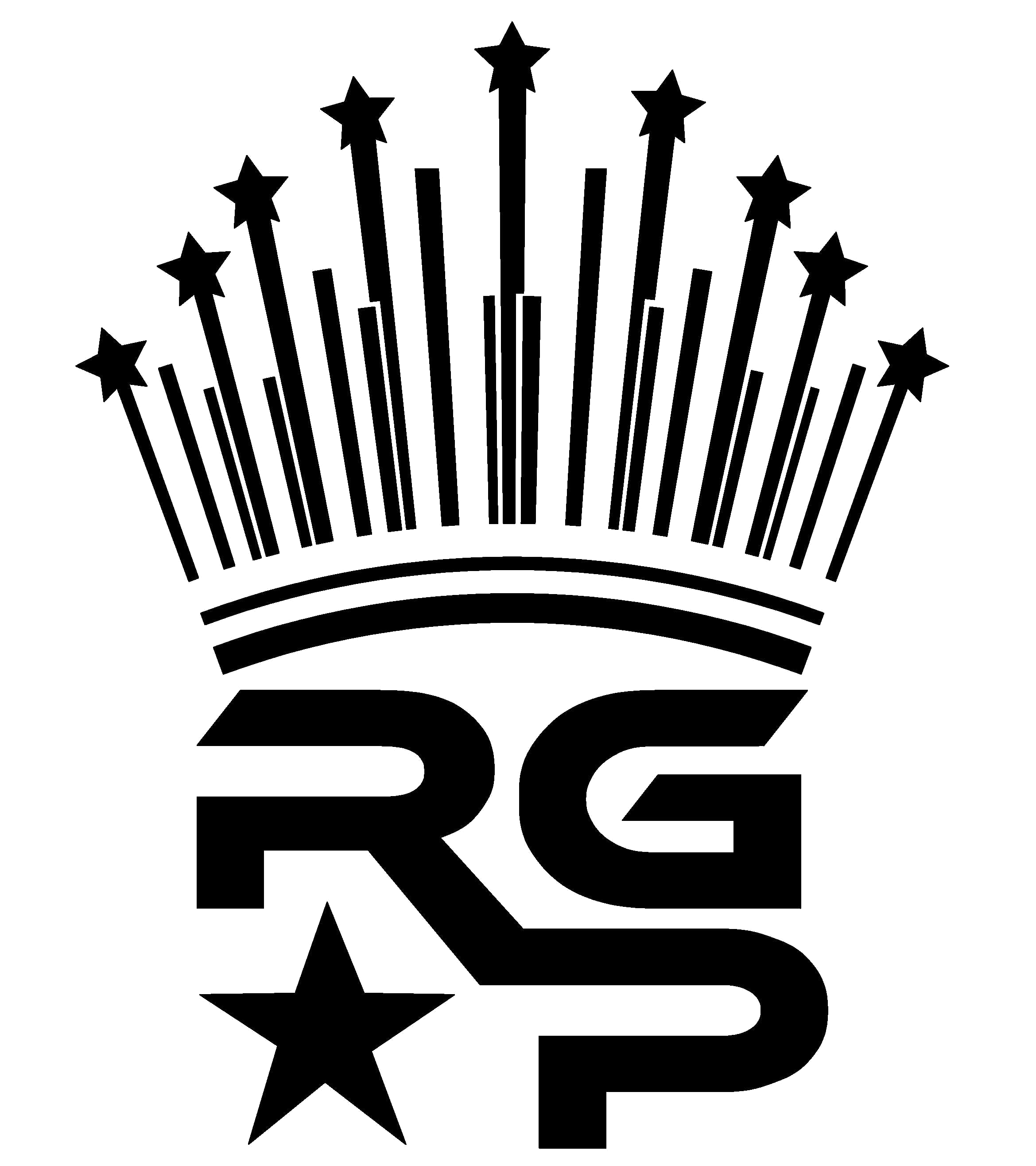 RealGirlsProject Logo